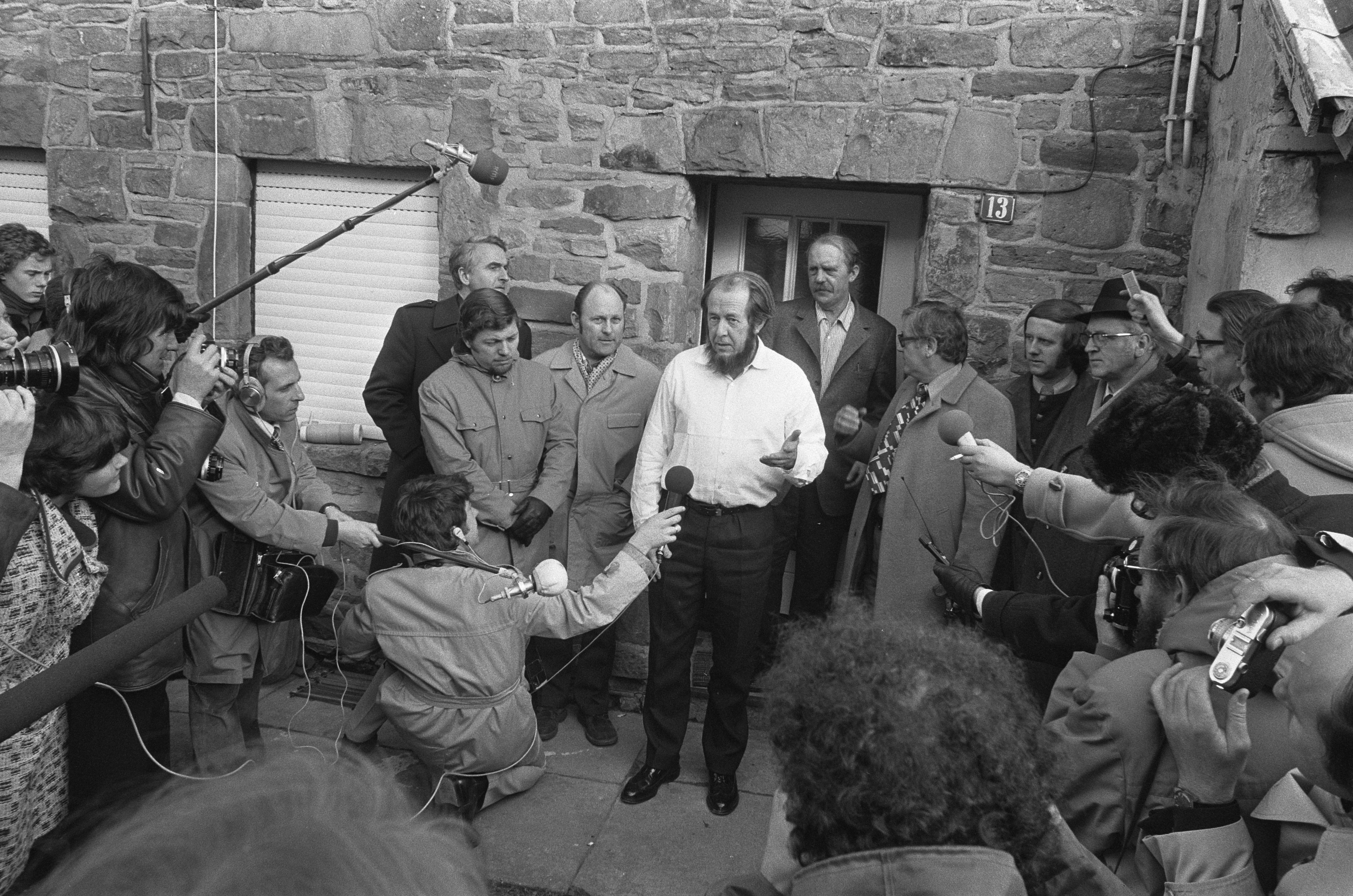 Collectie / Archief : Fotocollectie Anefo Reportage / Serie : De Russische schrijver Alexander Solzjenitsyn is uitgewezen uit Rusland en verblijft nu in het huis van Heinrich Böll Beschrijving : De schrijver staat de pers te woord, rechts naast hem Heinrich Böll Datum : 14 februari 1974 Locatie : Duitsland, Keulen Trefwoorden : pers, schrijvers Persoonsnaam : Böll, Heinrich, Solzjenitsyn, Alexander Fotograaf : Fotograaf Onbekend / Anefo Auteursrechthebbende : Nationaal Archief Materiaalsoort : Negatief (zwart/wit) Nummer archiefinventaris : bekijk toegang 2.24.01.05 Bestanddeelnummer : 927-0021